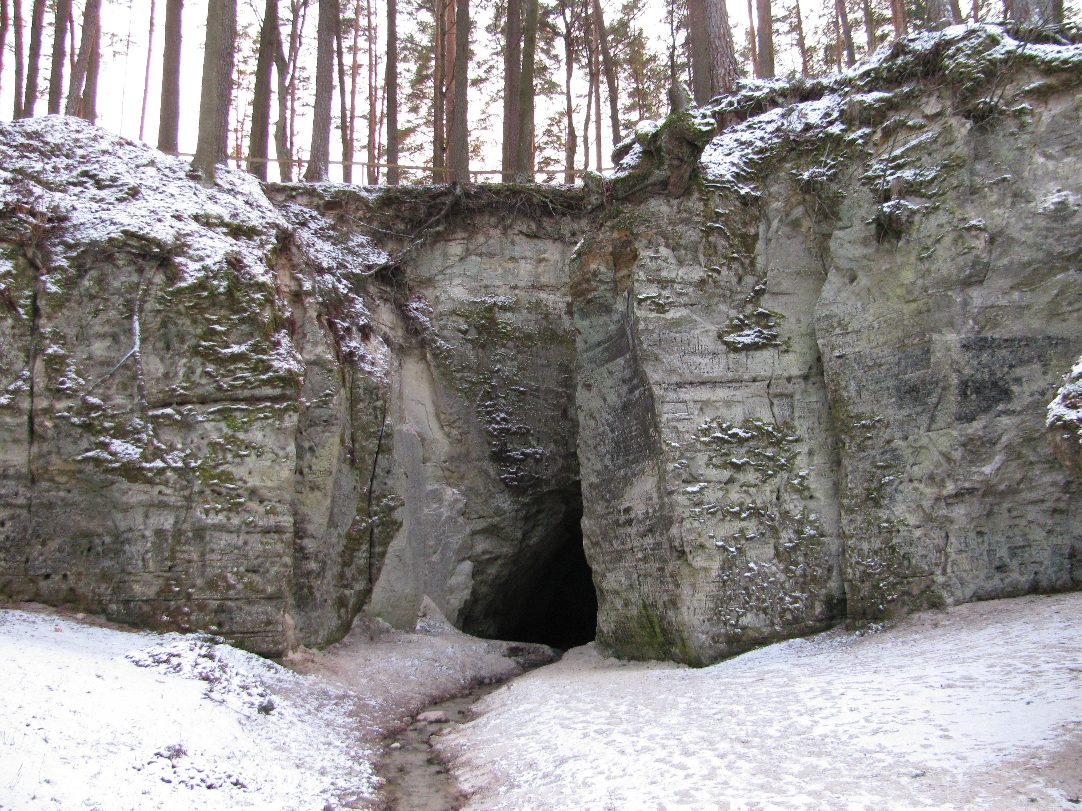 Liepas Lielās Ellītes ala ar avotu - kulta vieta, Liepa